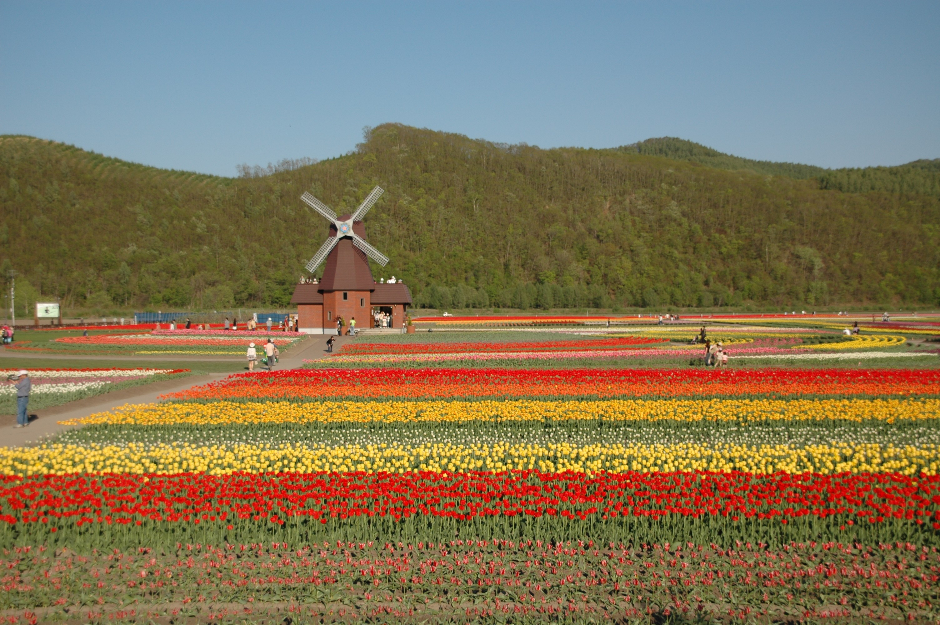 Tulip field, Kamiyubetsu, Hokkaido, Japan